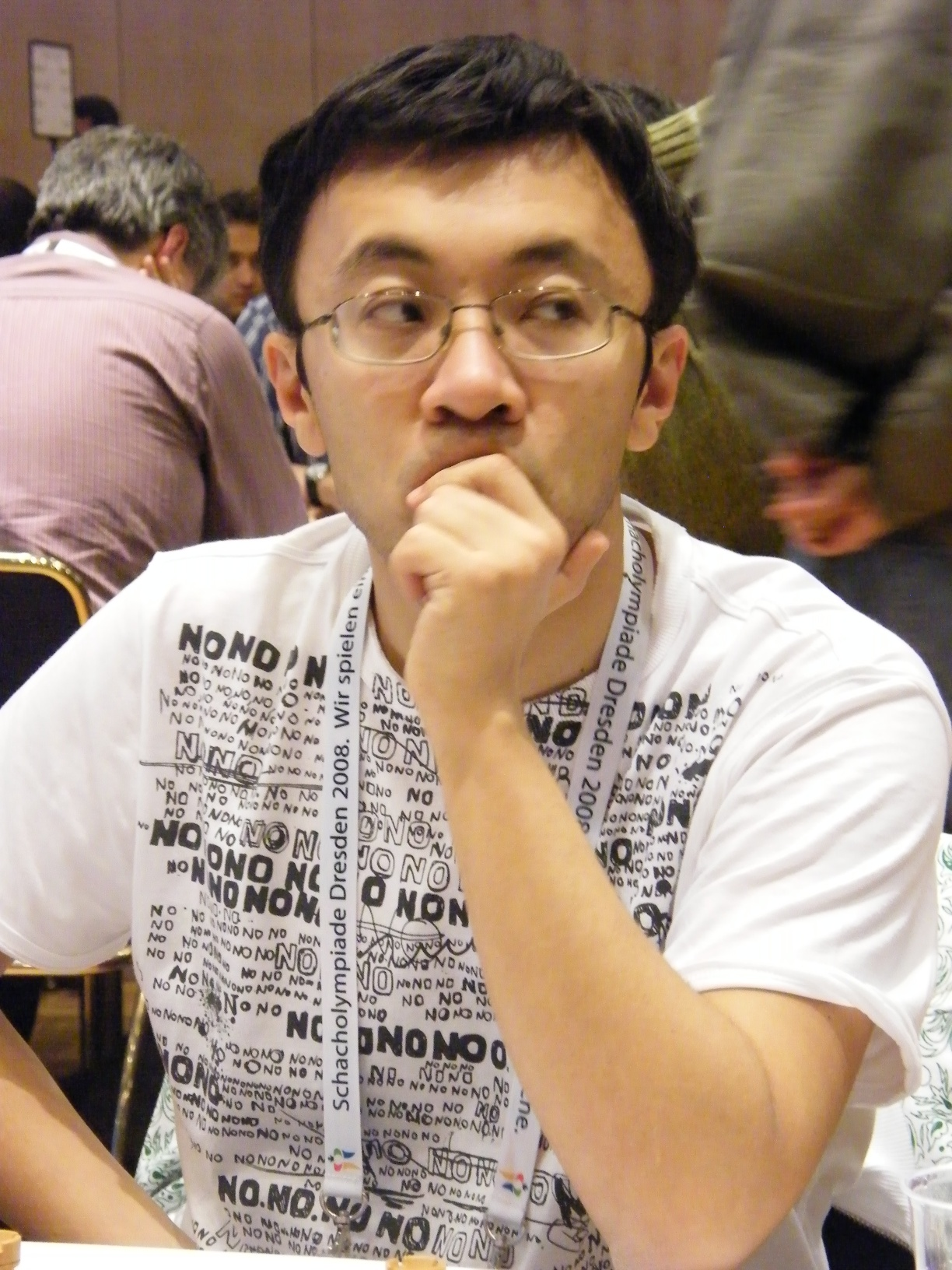 Murtas Kasgalejew bei der 38. Schacholympiade in Dresden 2008